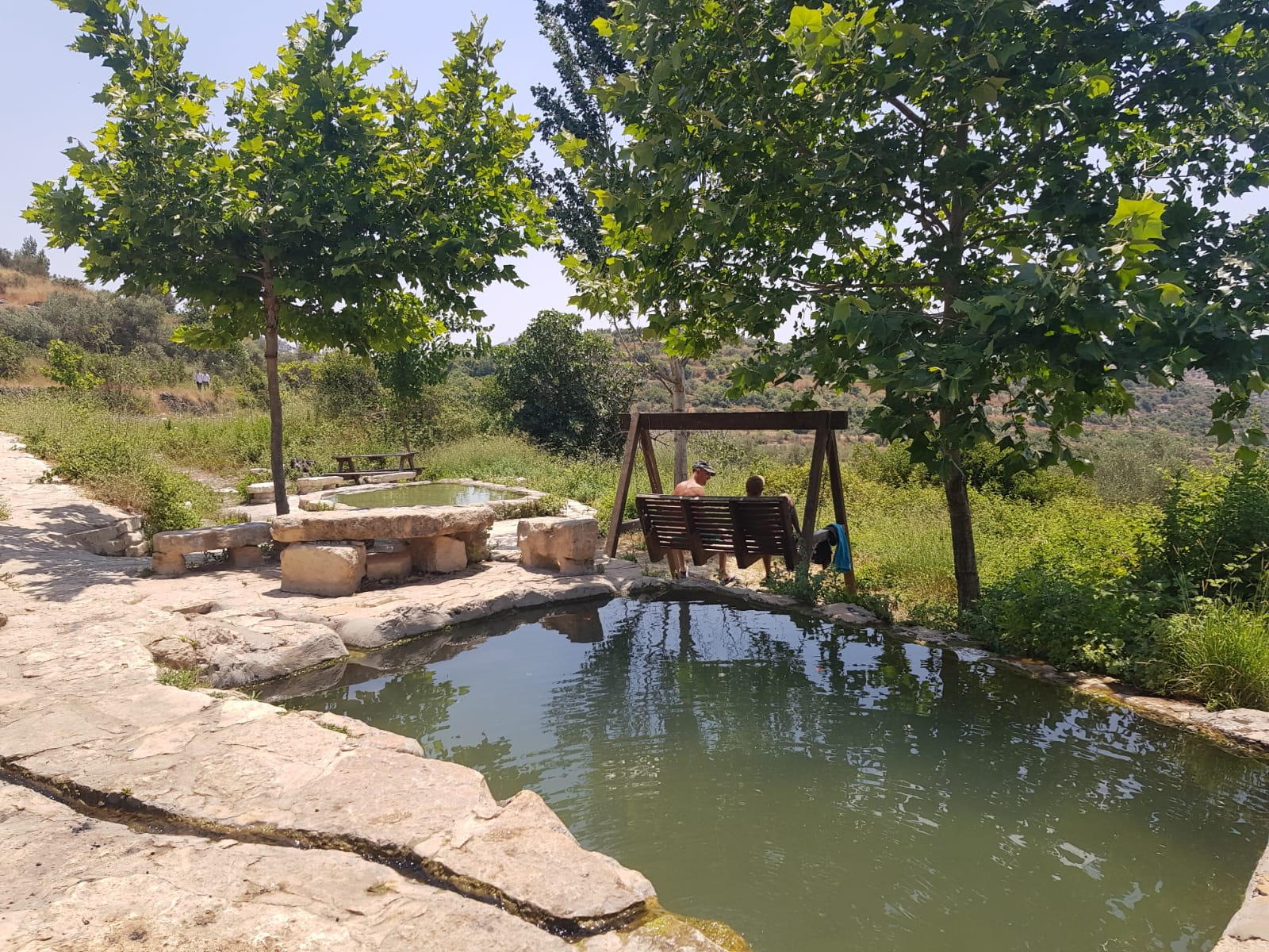 עינות ענר הבריכה הגדולה קיץ 2019